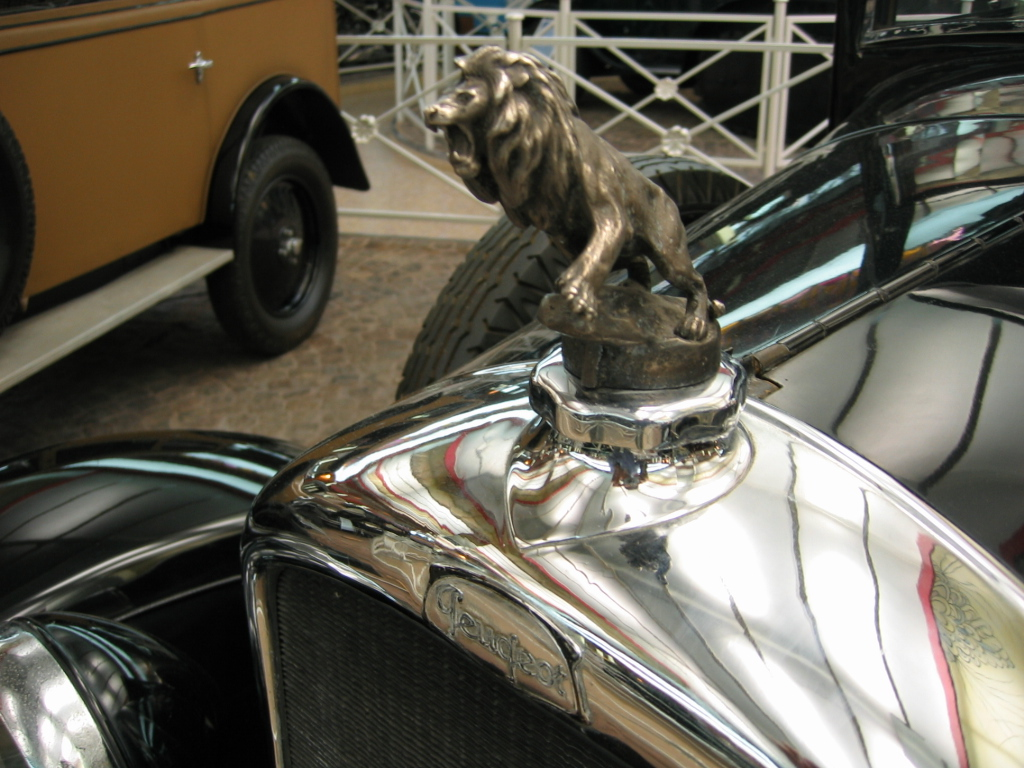 Peugeot Type 177 - Musée Peugeot Sochaux